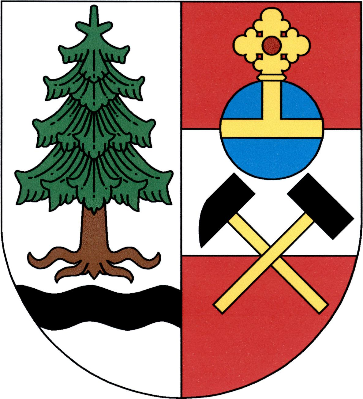 Znak obce Kryštofovy Hamry